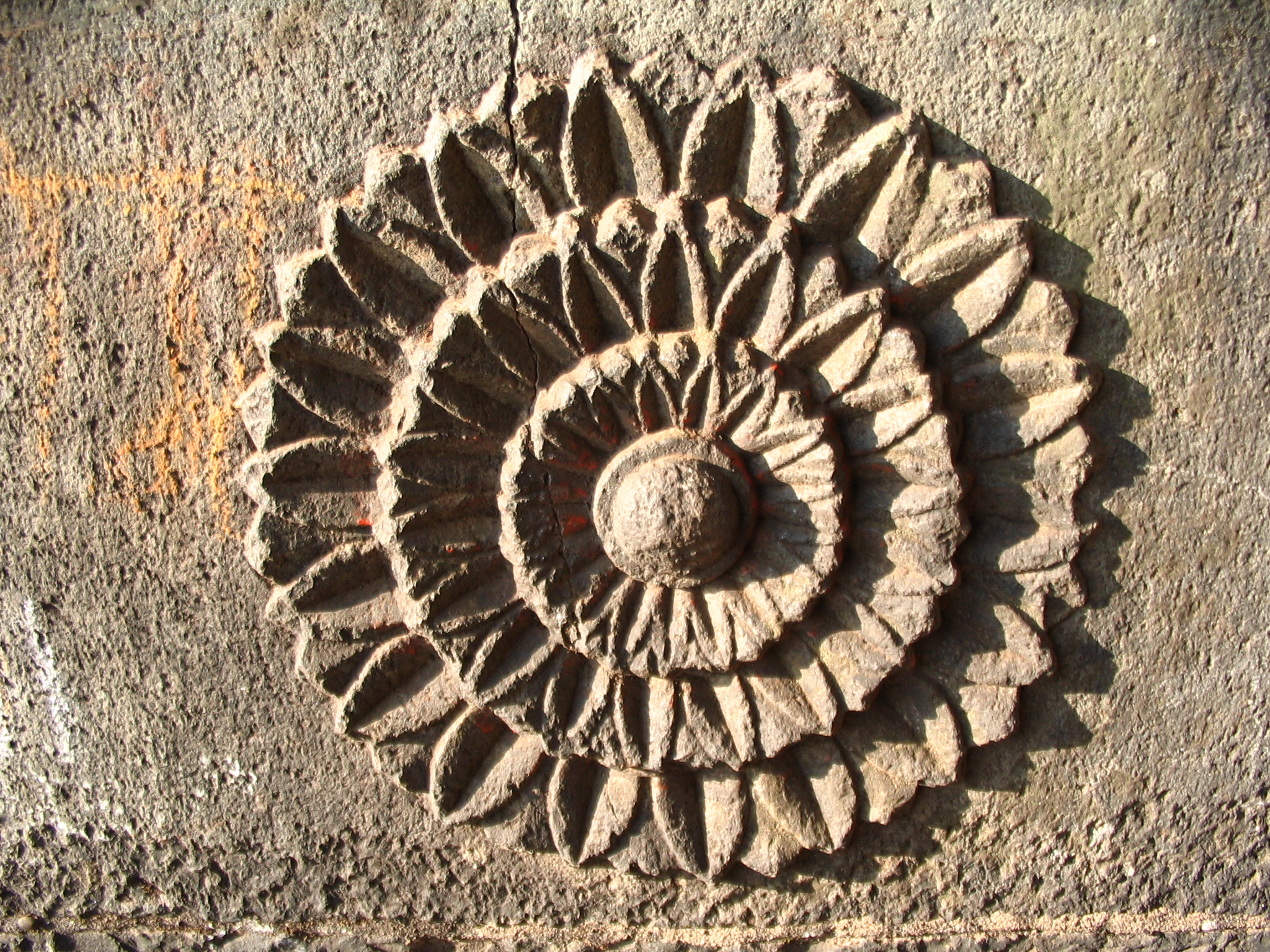 Lotus carvings, Panhala fort, Mumbai, India.